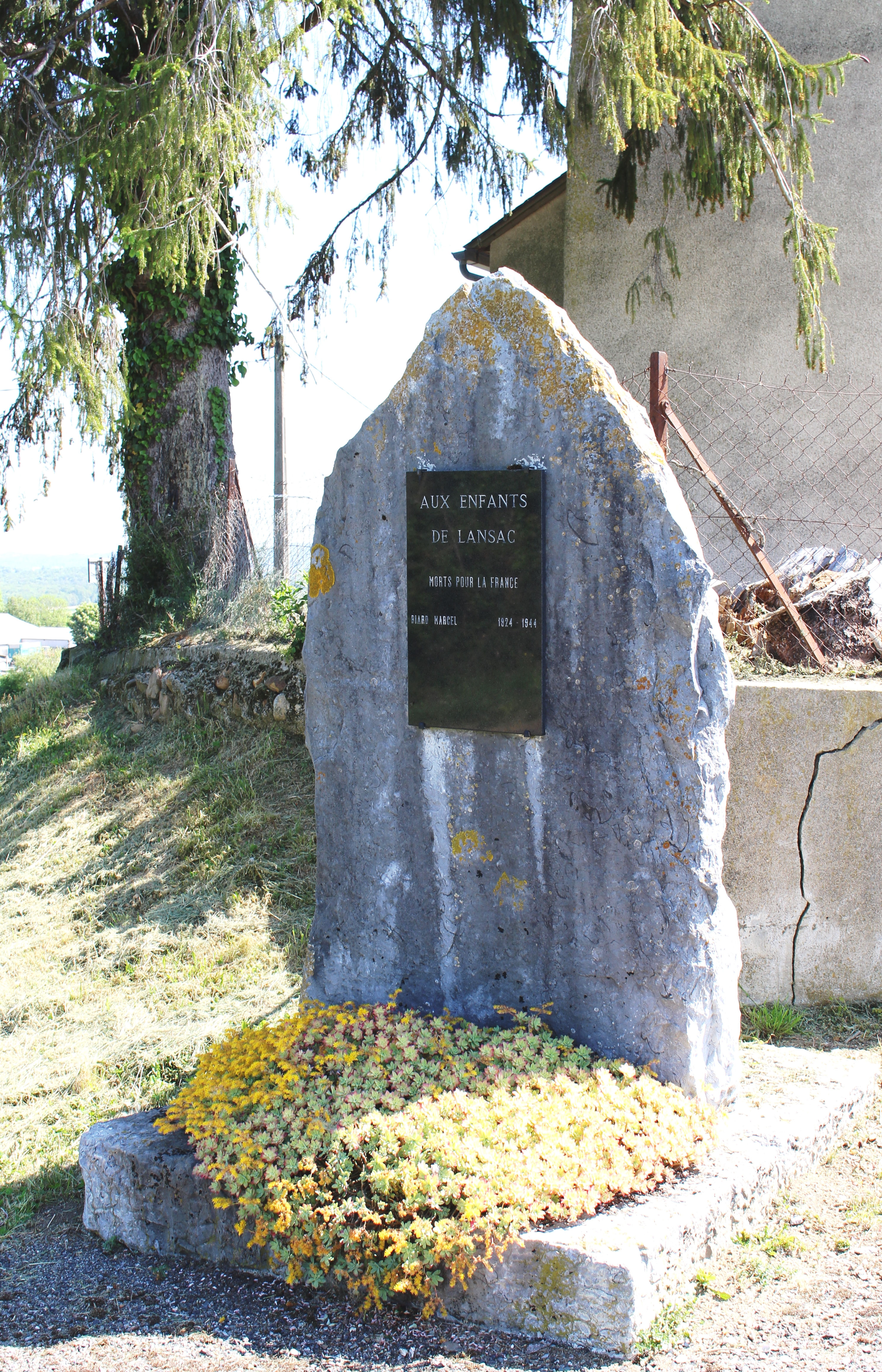 Monument aux morts de Lansac (Hautes-Pyrénées)